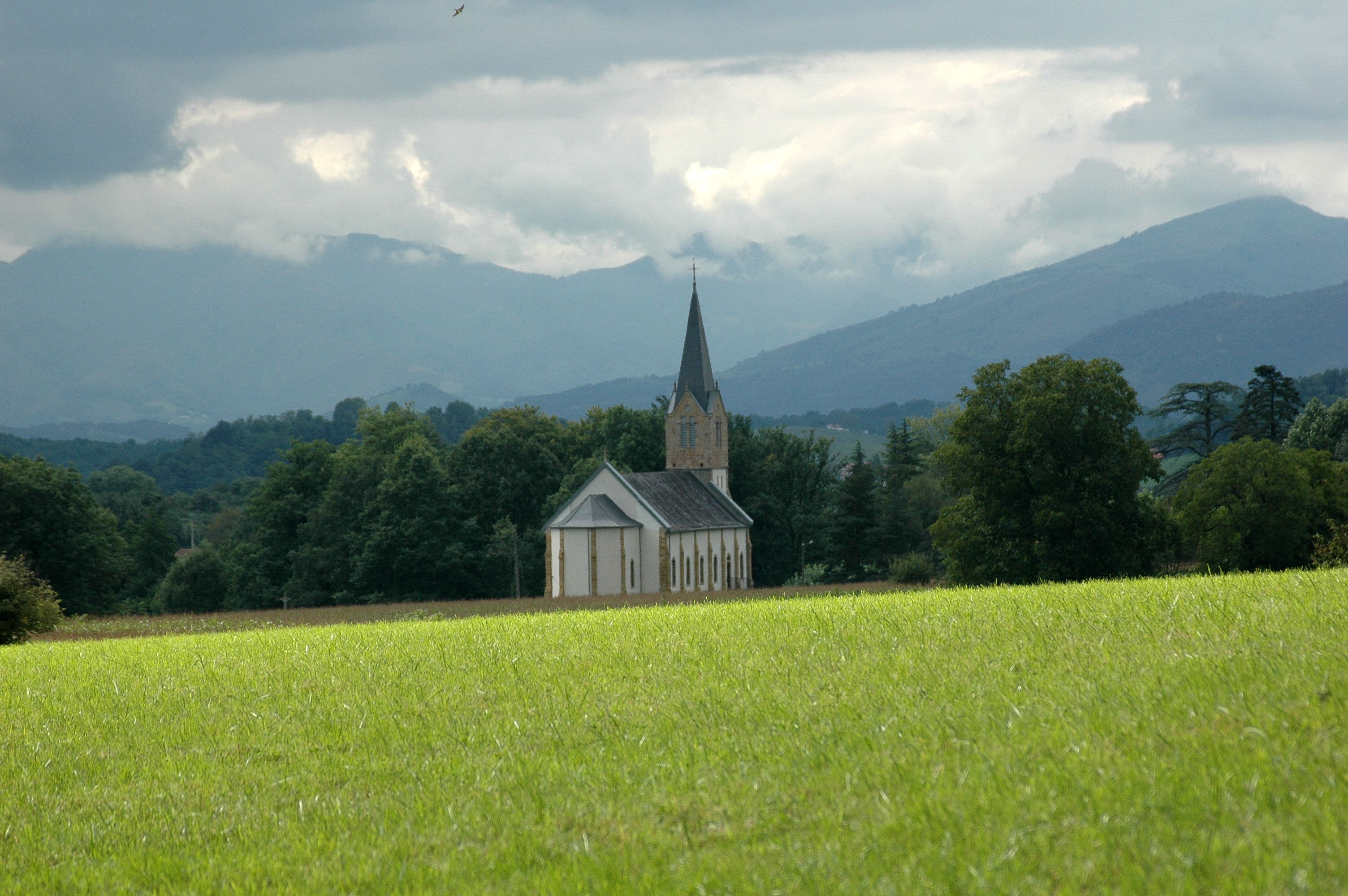 San Martin eliza, Lekunberrian